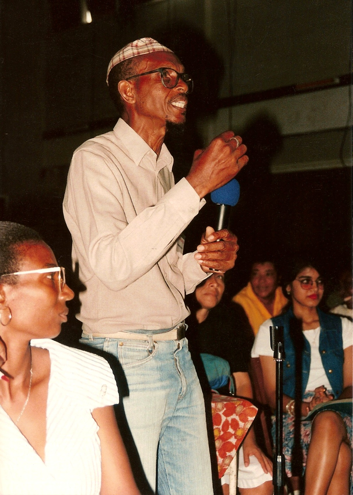 S. Sombra, Surinaams dichter. Eigen opname uit juli 1997.